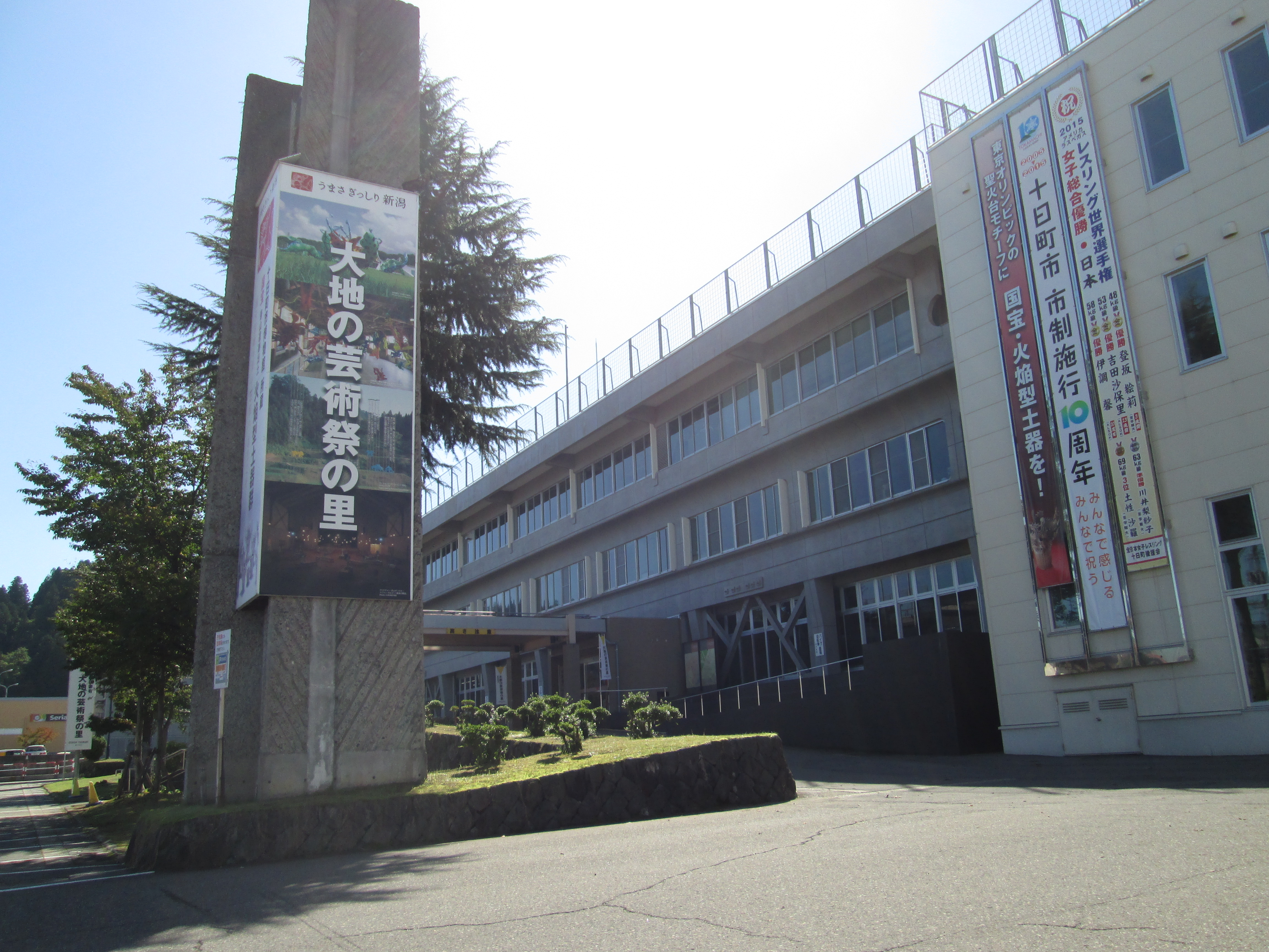 十日町市役所の外観です